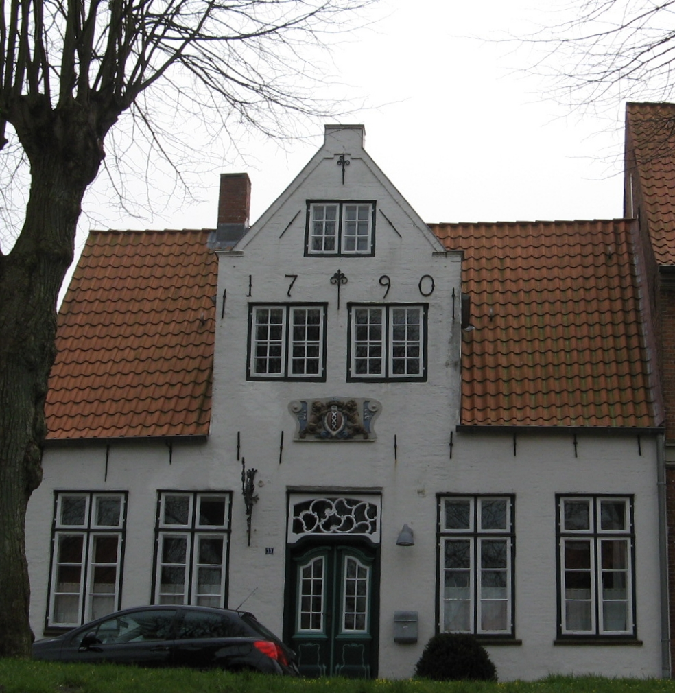 Haus mit Amsterdam-Wappen-Hausmarke Author: Dirk Ingo Franke